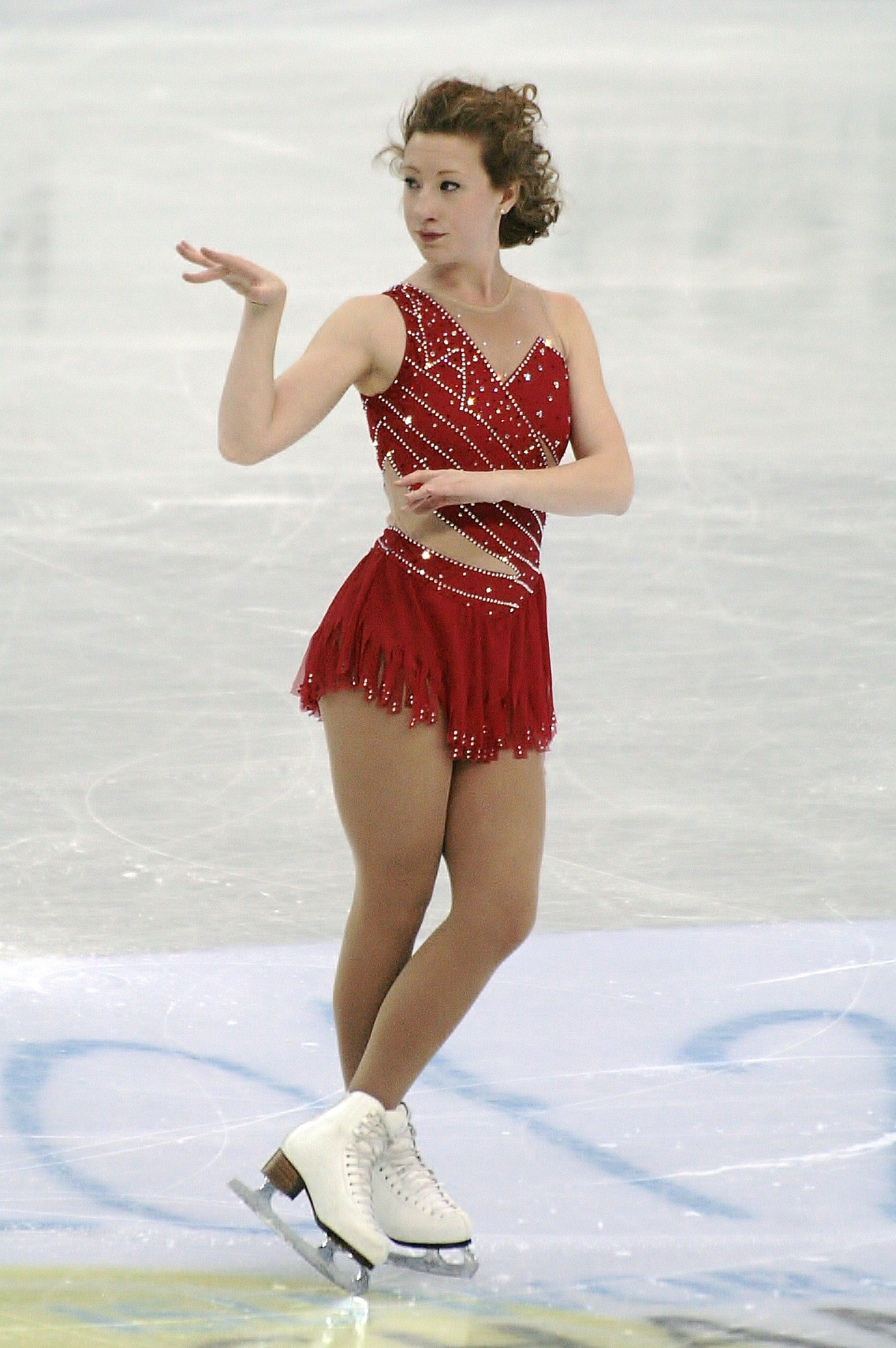 Клара Петерс (Ирландия) на чемпионате мира по фигурному катанию 2012.